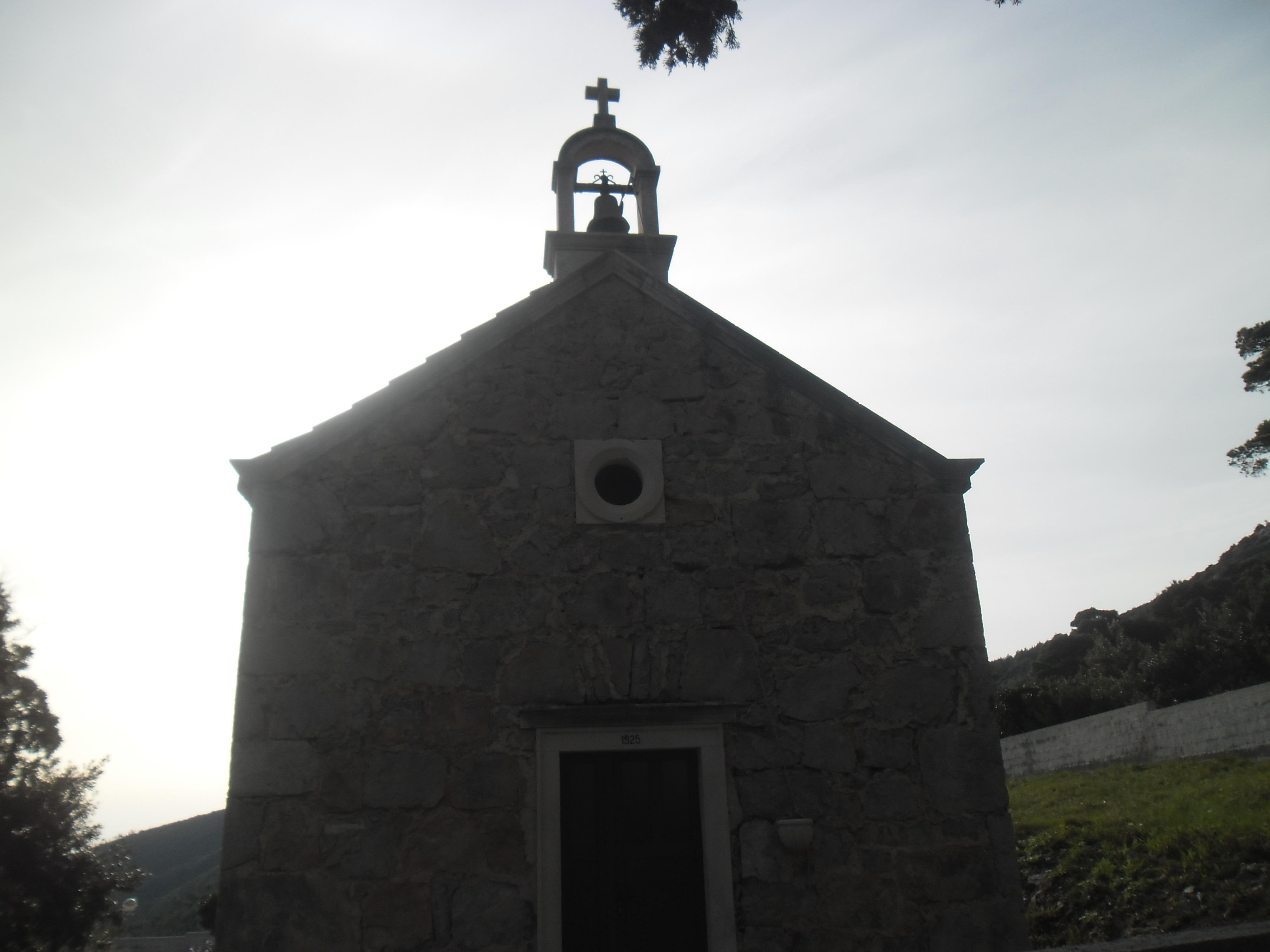 Ropa na otoku Mljetu